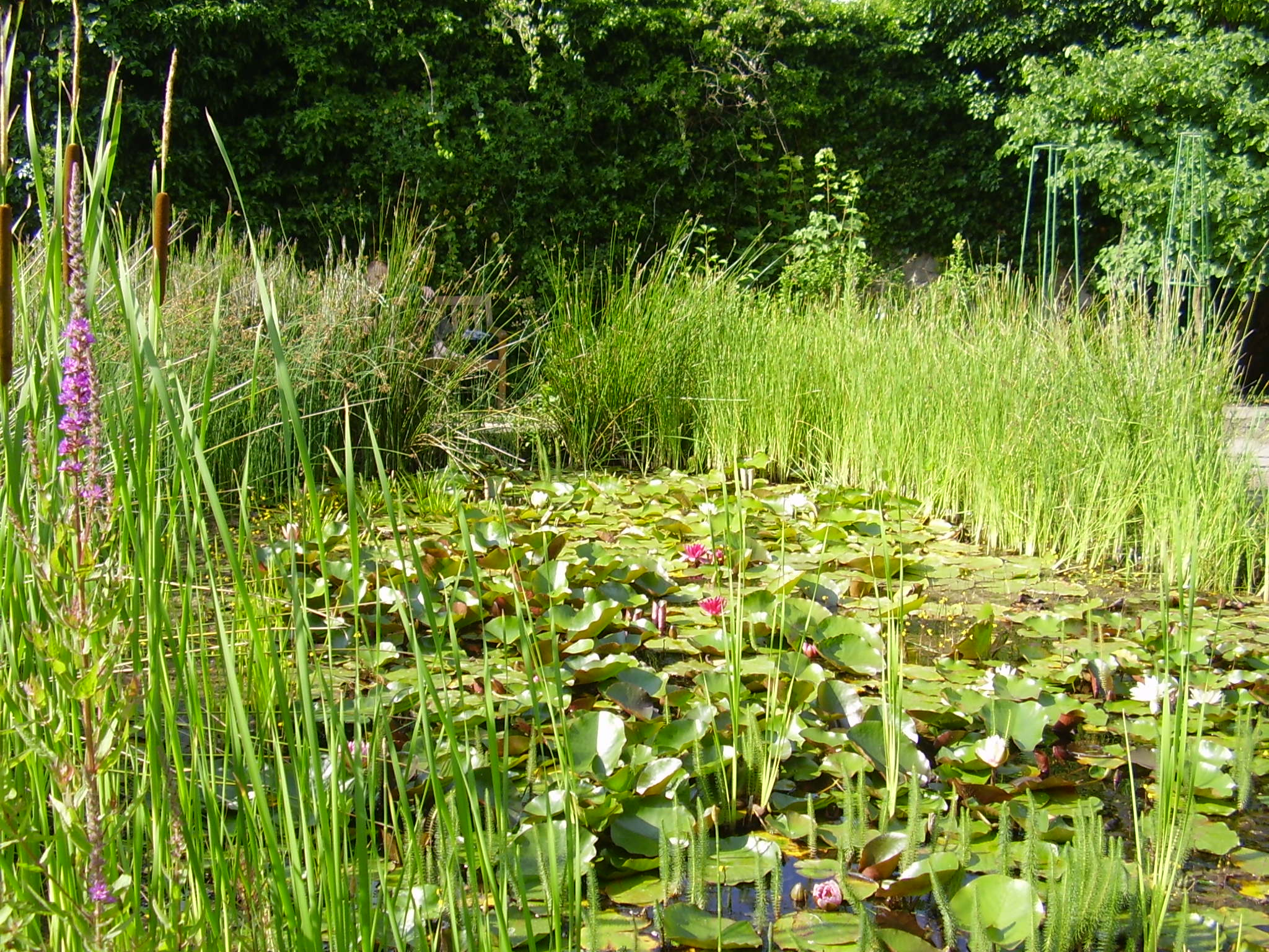 Alter botanischer Garten Göttingen.